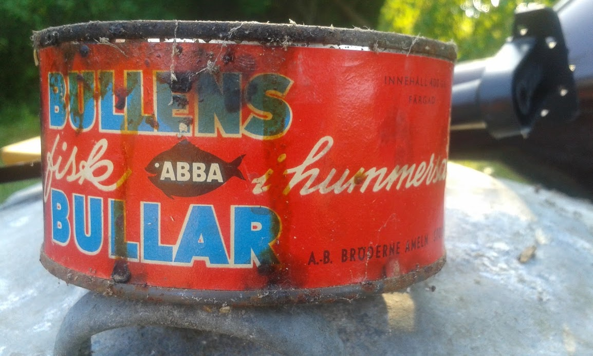 Burk med Bullens fiskbullar i hummersås från AB Bröderna Ameln AB (Abba).